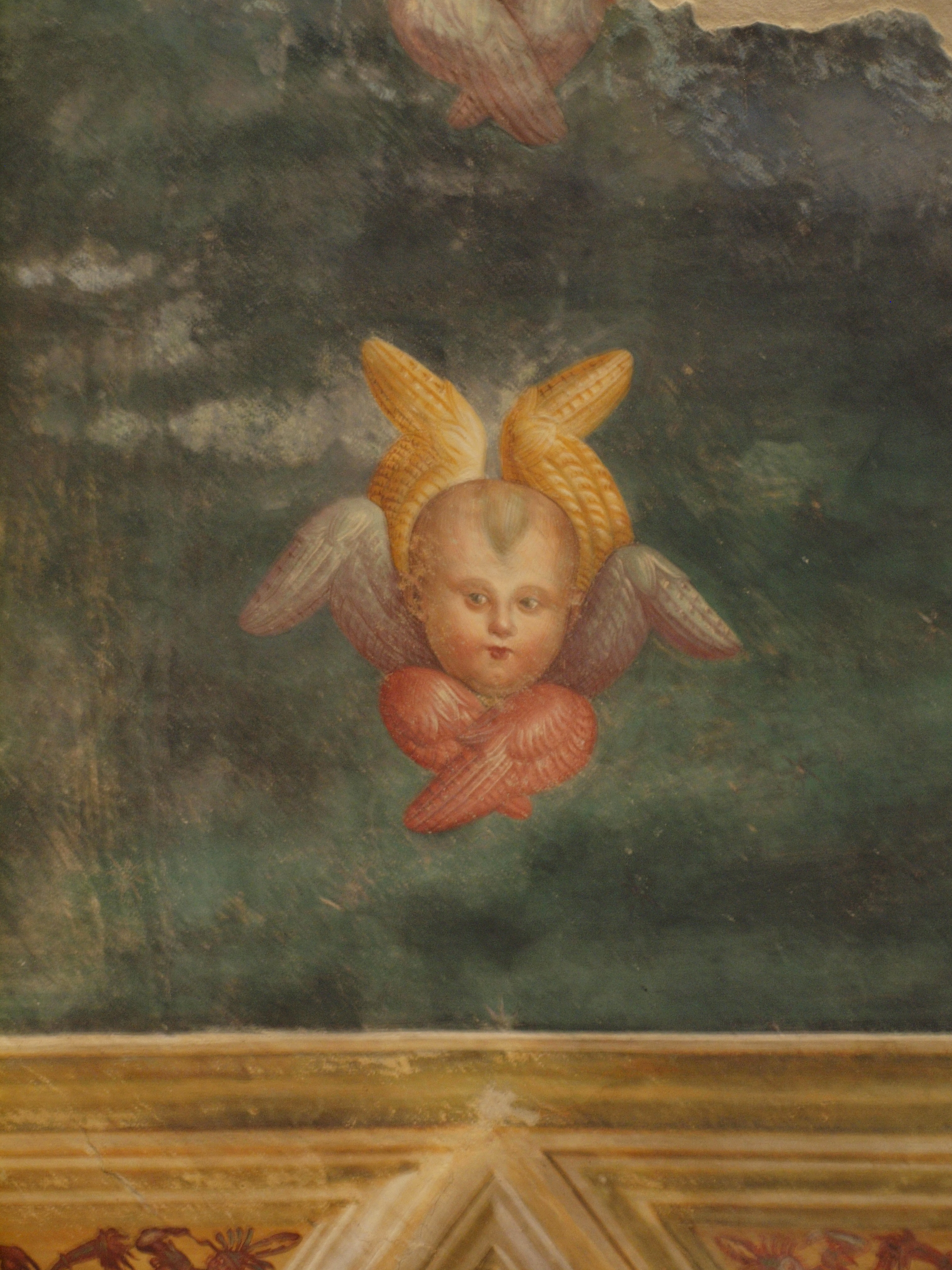 Un séraphin par Pietro Vannucci, Perugino